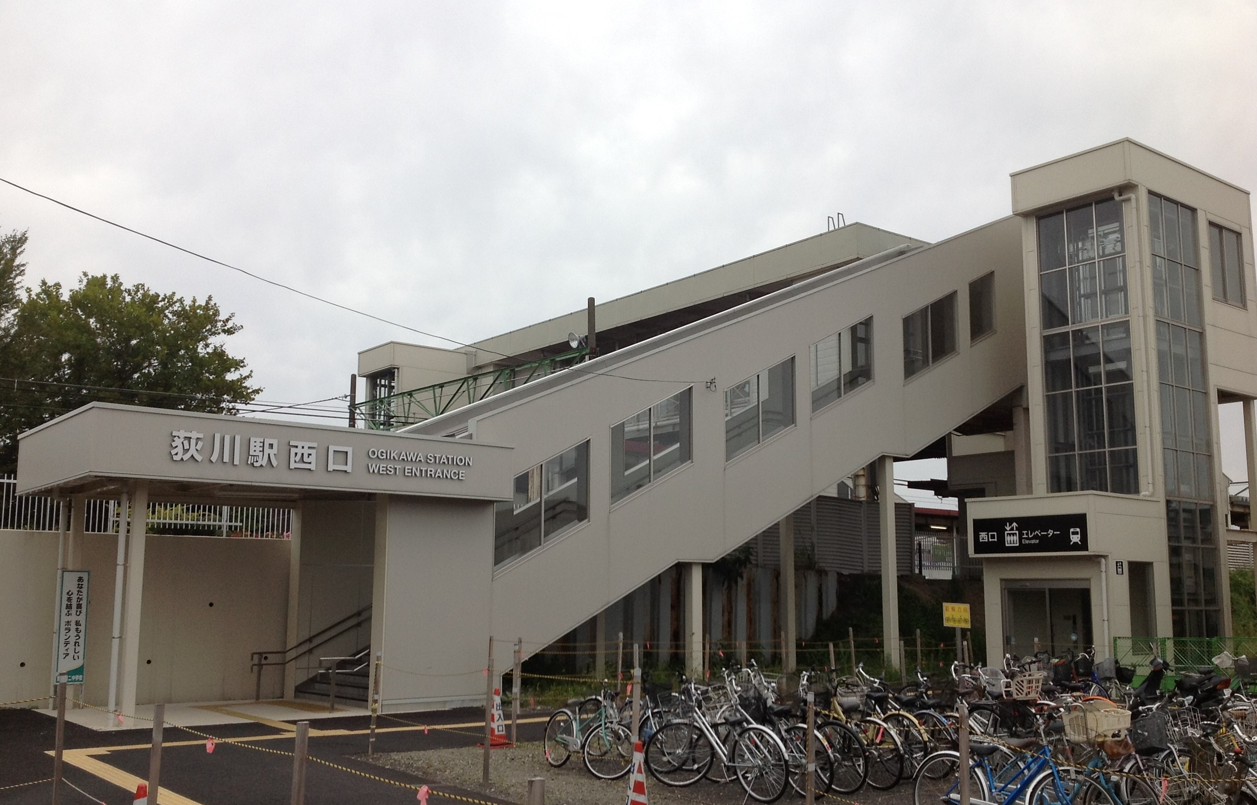 荻川駅西口